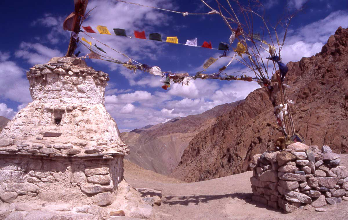 Pass between Hemis Shakpachen and Ang in Ladakh.